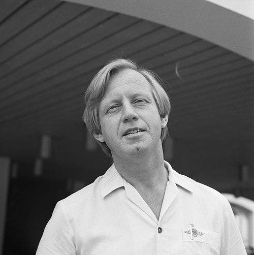 Sipke van der Land in AVRO's Sterrenslag